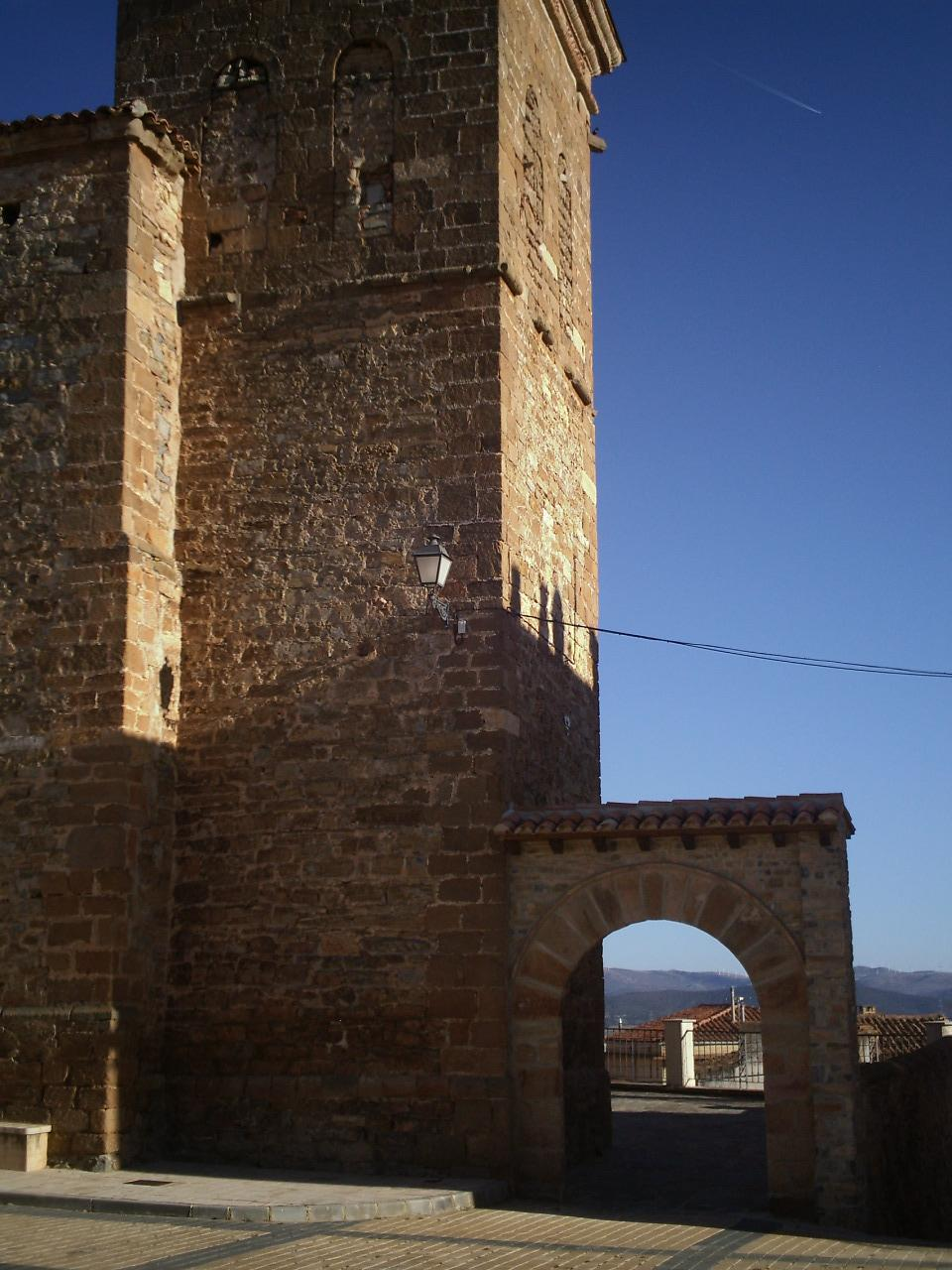 Castilruiz en Soria, España